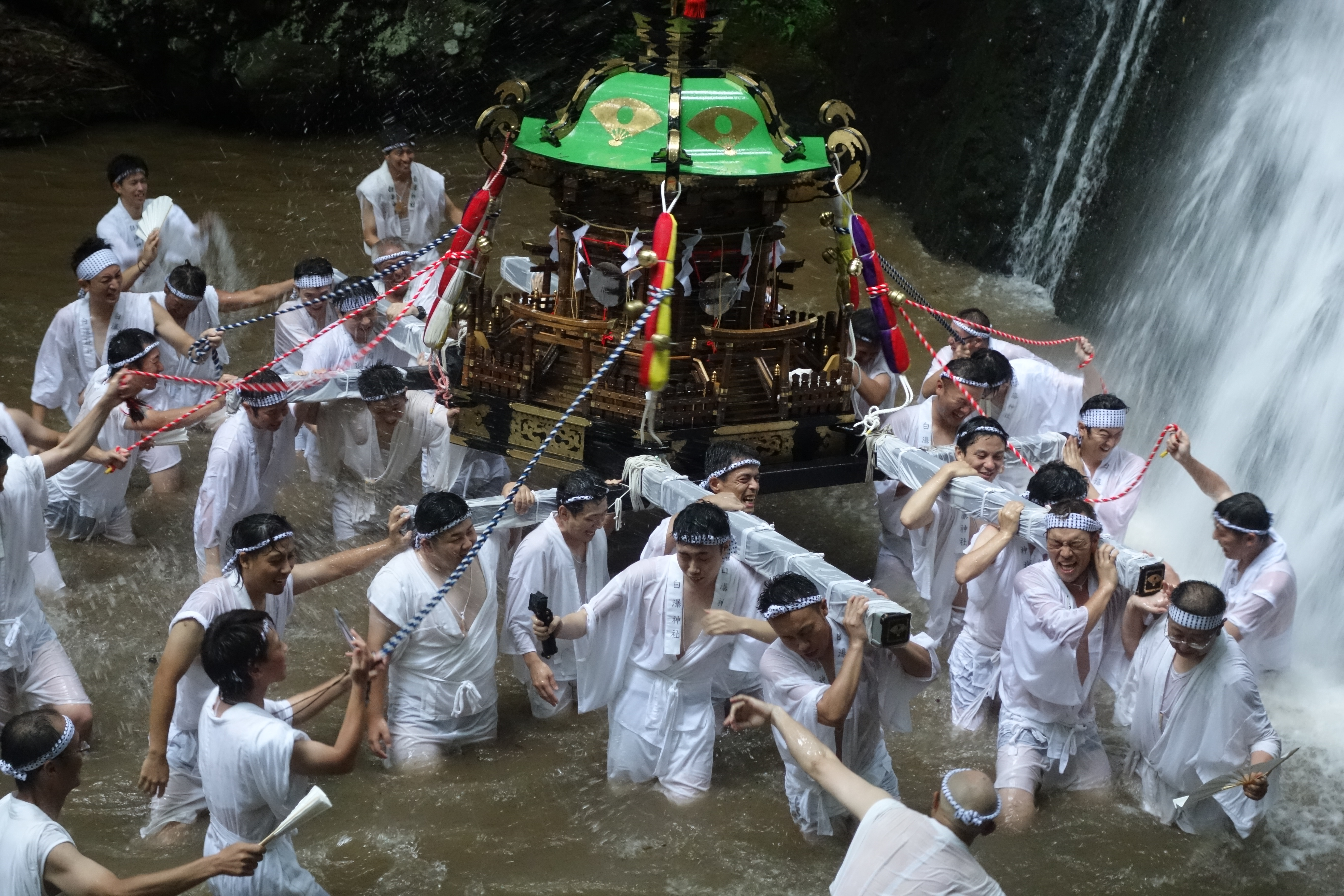 秋田県八峰町白瀑神社みこし祭り